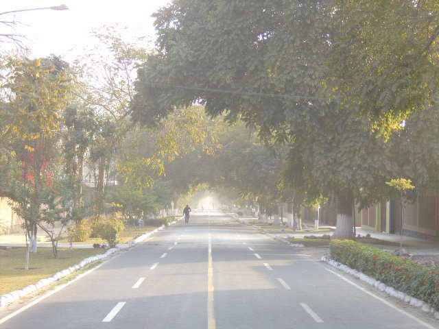 Calle del Centro Tradicional de Chaclacayo Fuente: Nestor Ulaf Salcedo Zuta. Coleccion personal. Junio 2006